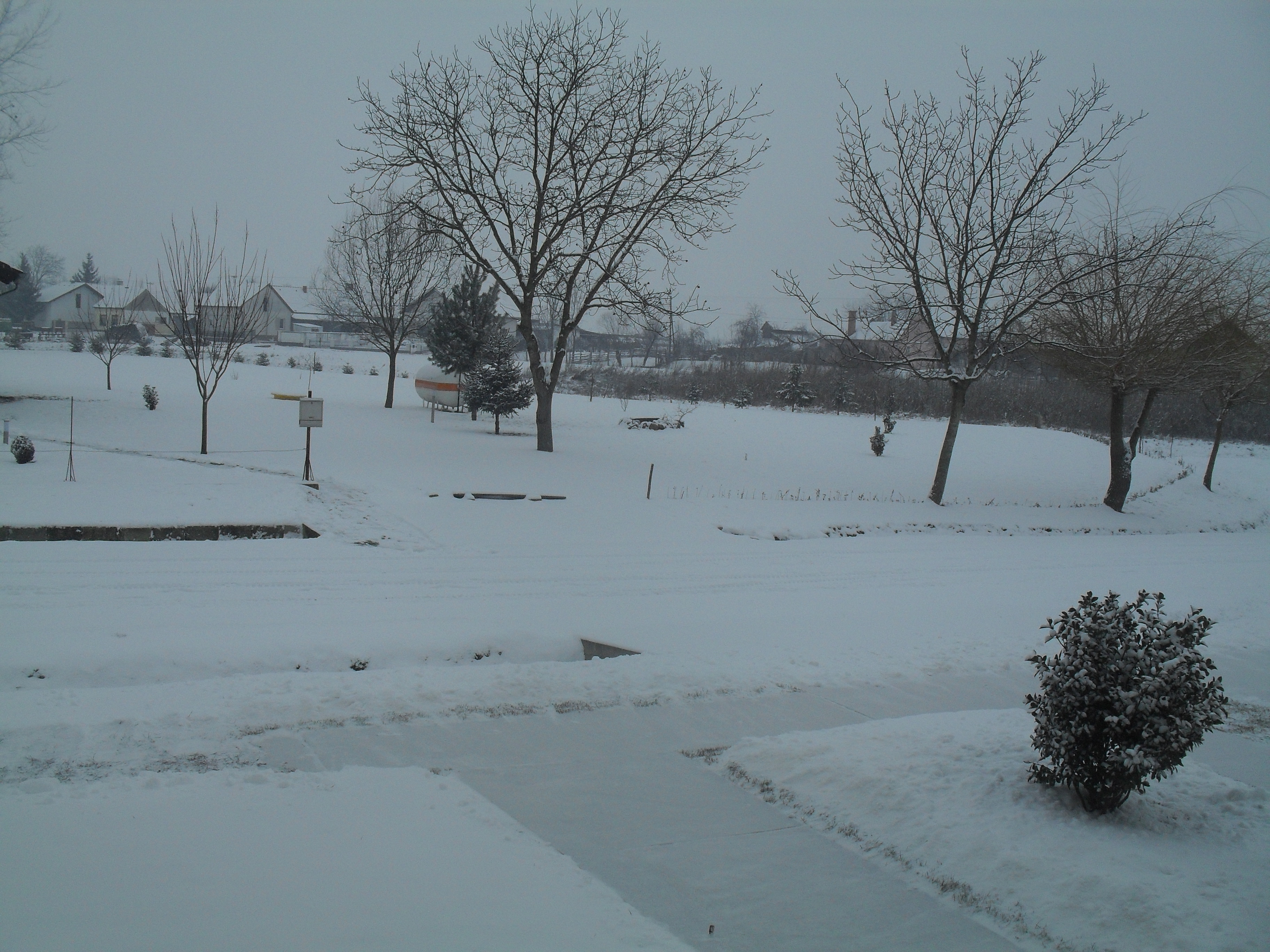 zima....